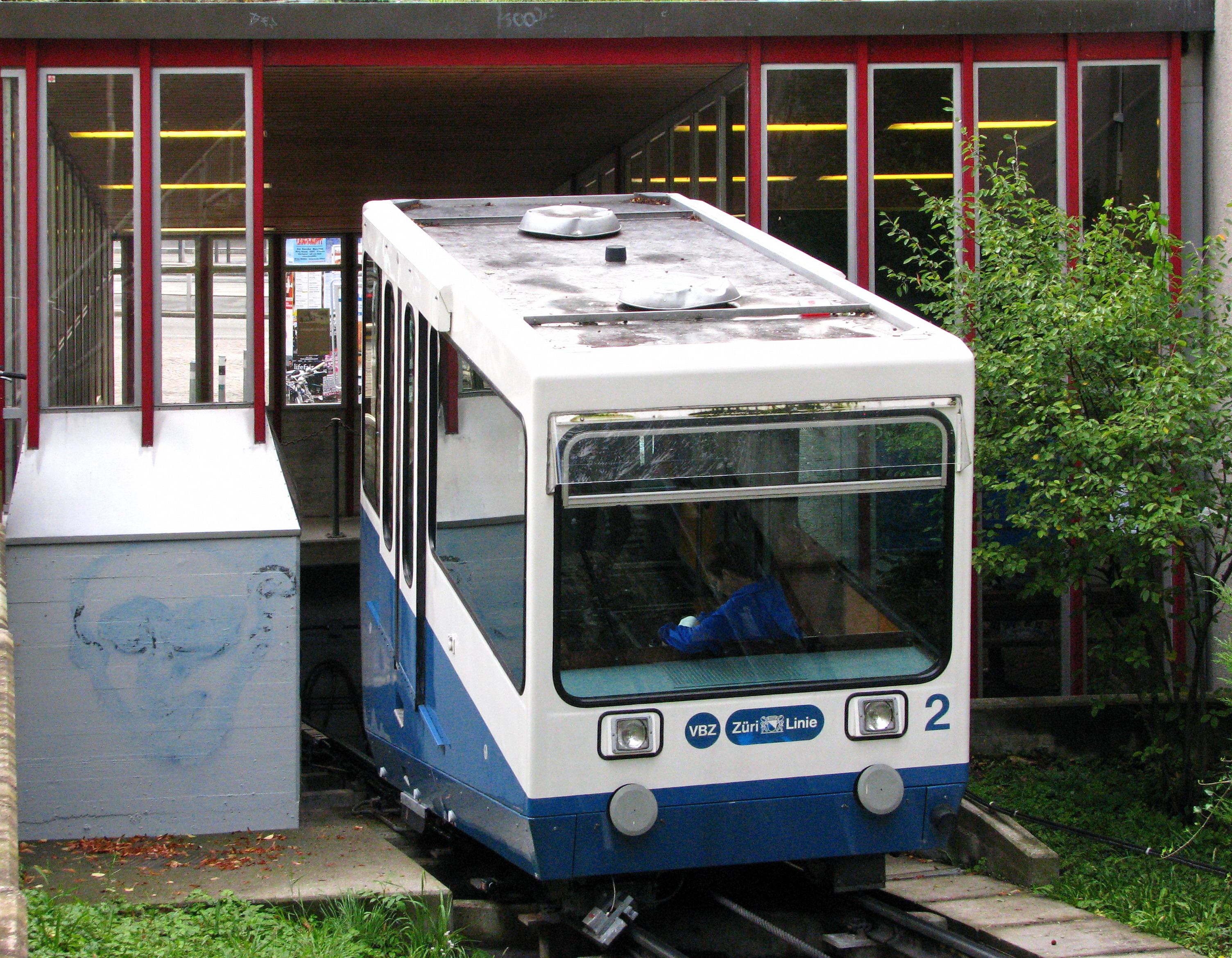 Seilbahn Rigiblick lower station in Zürich-Oberstrass